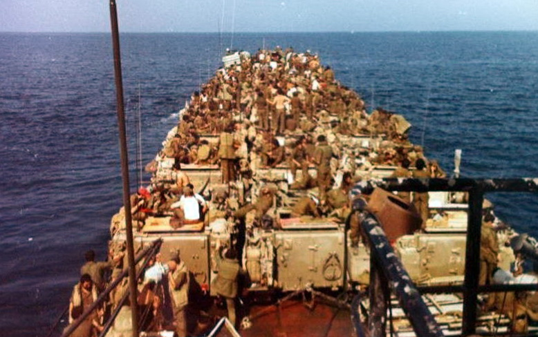 על הנחתת בדרך לשפך האוואלי